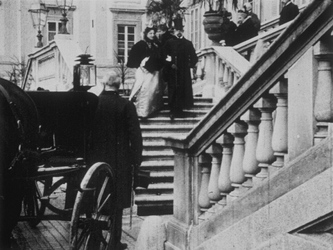 Le roi Humbert Ier et la reine Marguerite de Savoie descendent l’escalier, suivis par quelques personnes puis montent dans une calèche